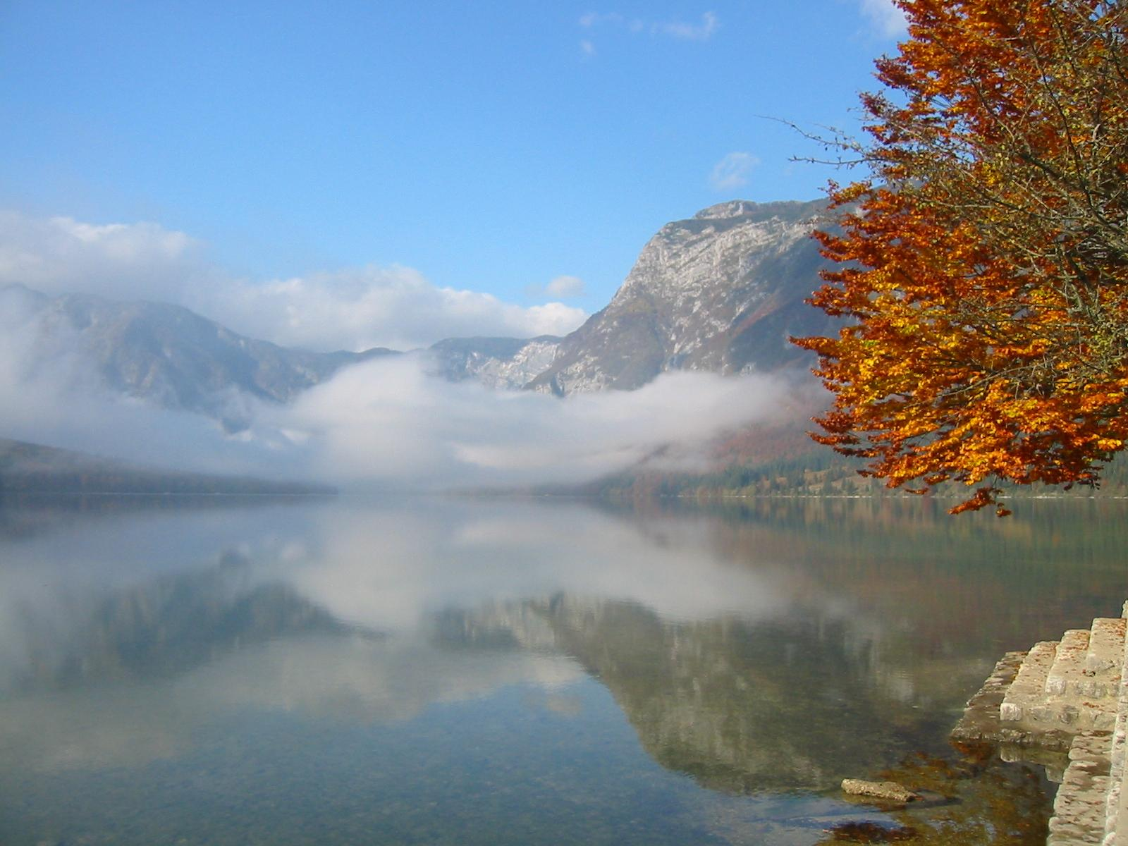 Bohinj lake, Slovenia photo:Ziga 10:33, 16 April 2007 (UTC)